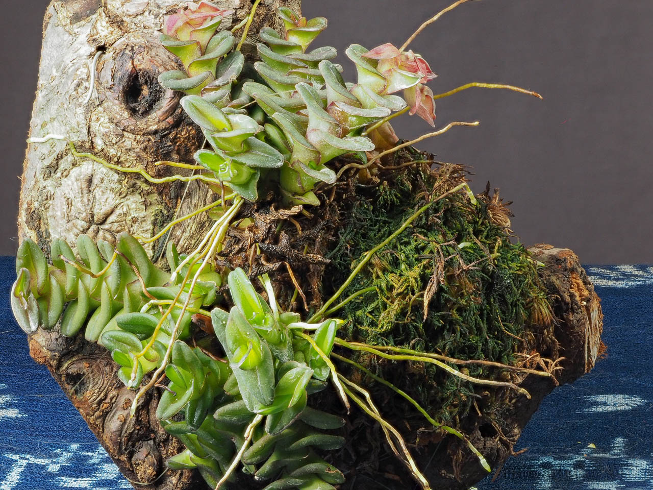 Epidendrum schizoclinandrium